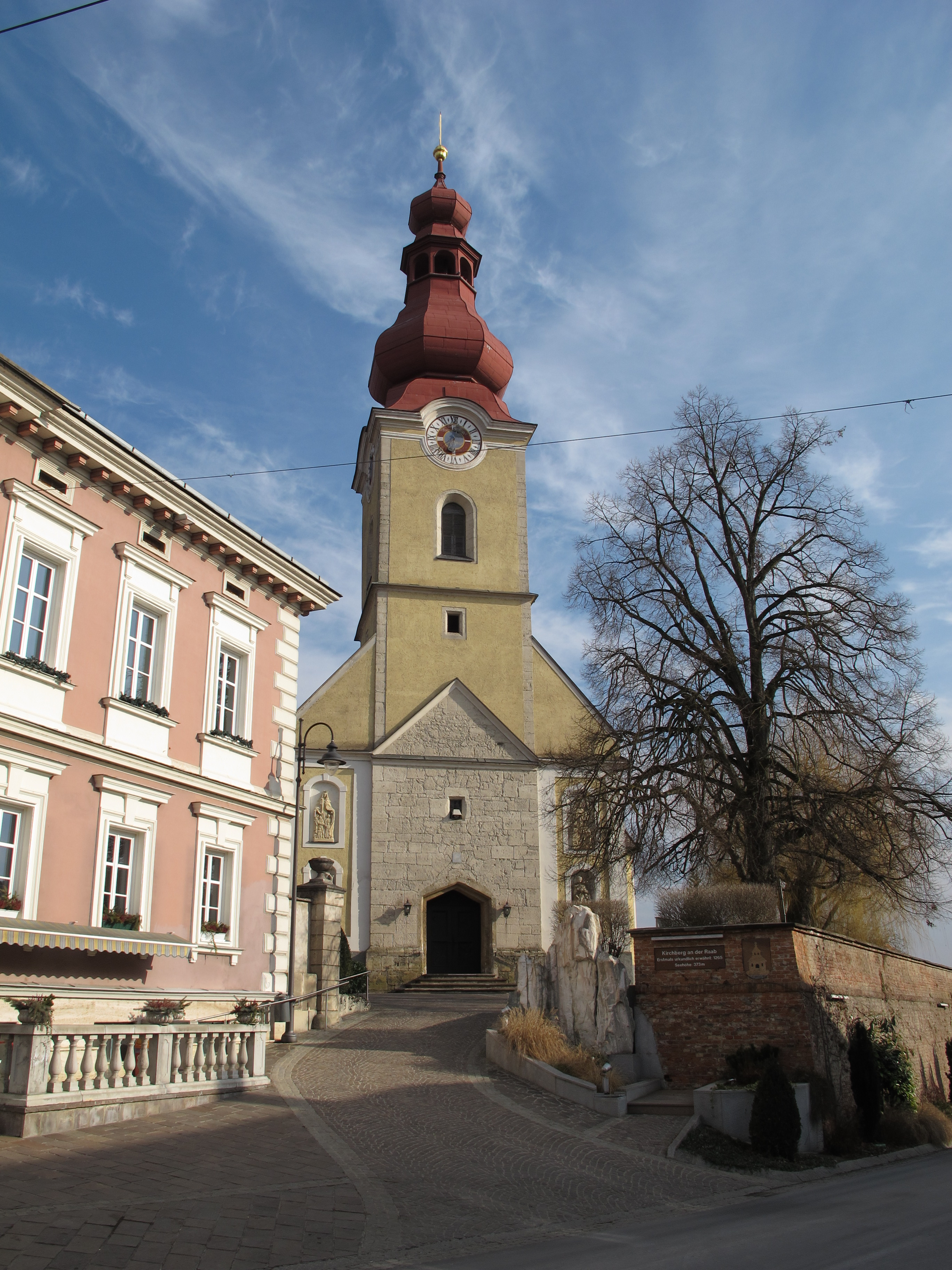 Kath. Pfarrkirche hl. Florian